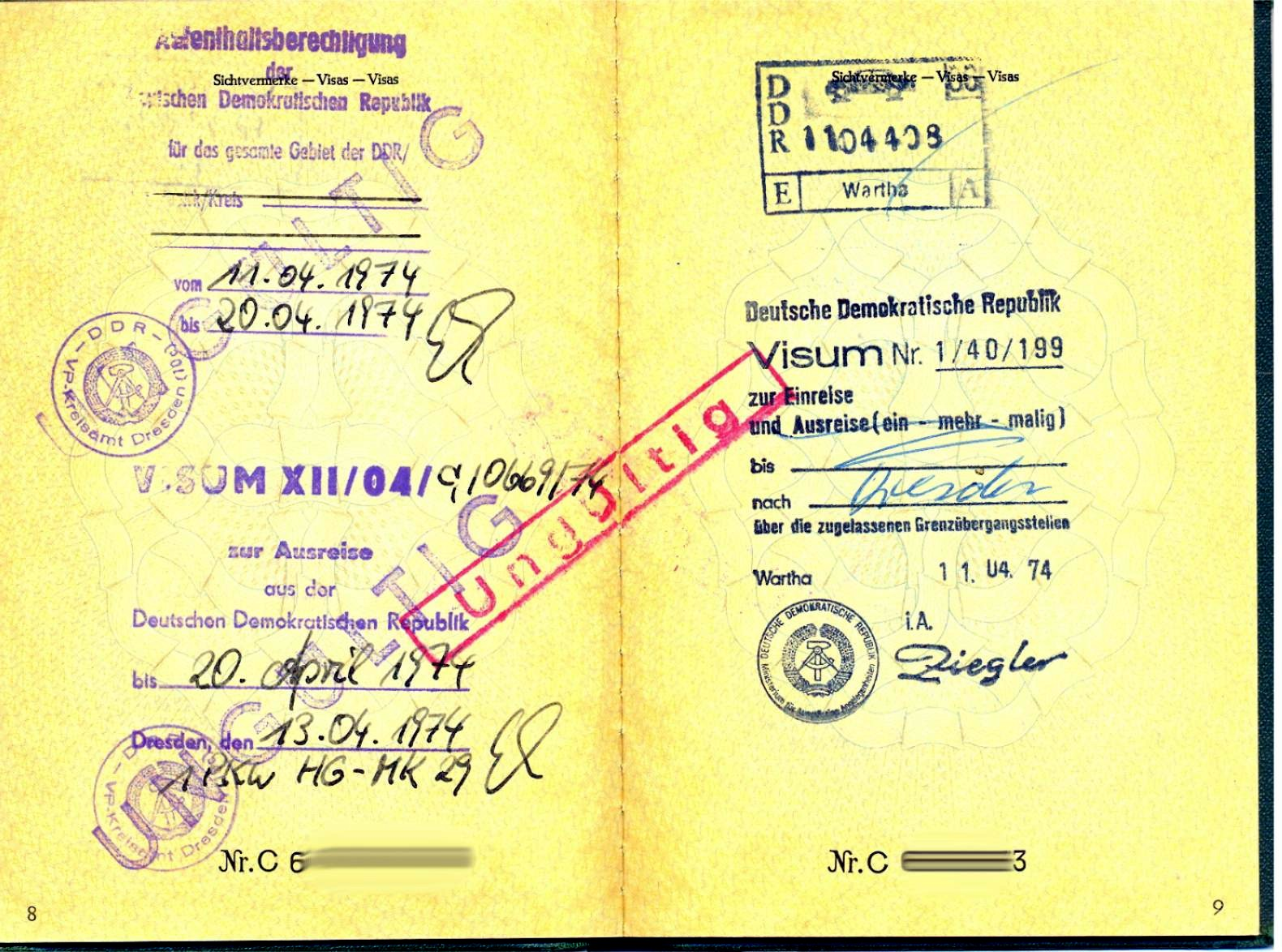 Visastempel der DDR